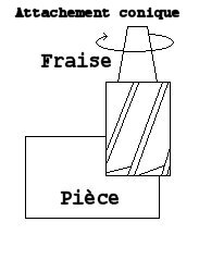 dessin personnel d'une fraise 2 tailles